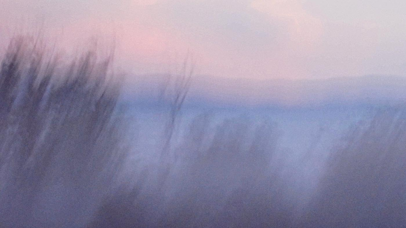 מתוך תערוכת הצילומים "בין ערפל לצל"